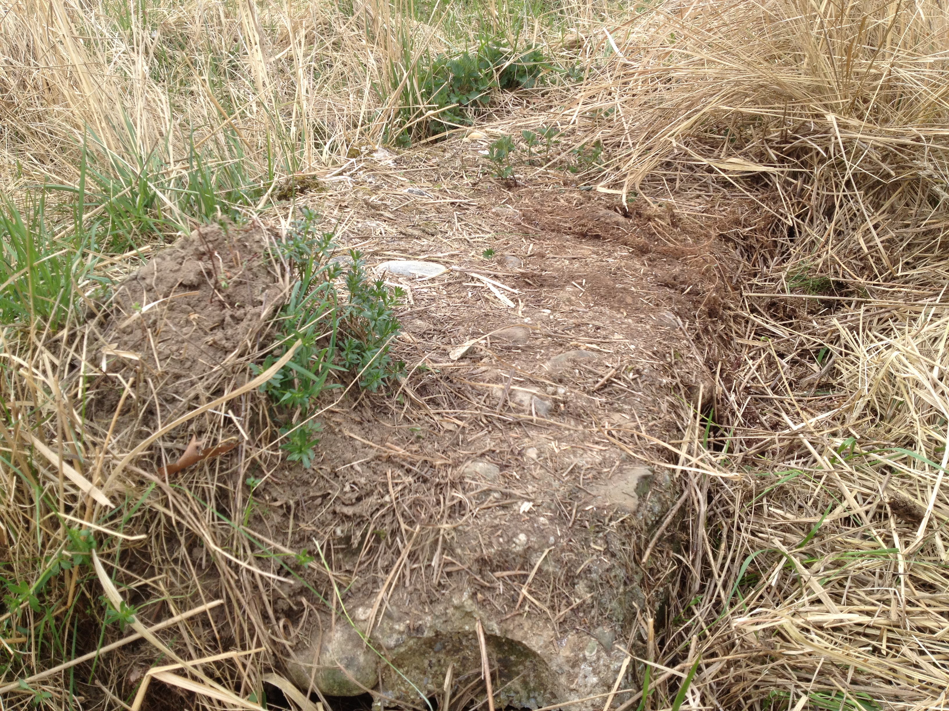 Tergolape